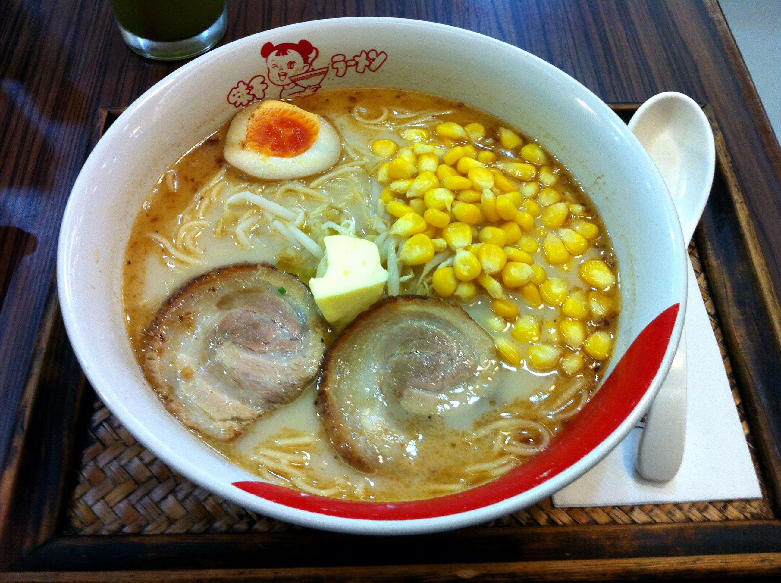 Butter-Corn Ramen Set @Ajisen Ramen